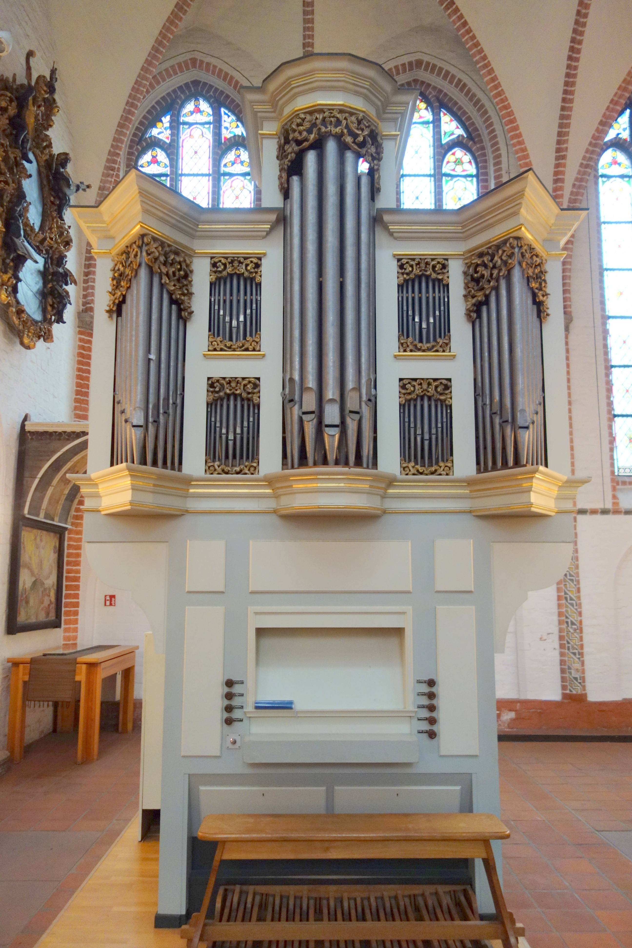 Chororgel in St.-Petri-Kirche Buxtehude, Landkreis Stade, Niedersachsen, Deutschland